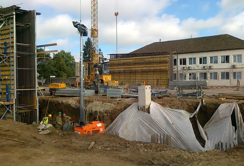 Fosta cladire DSV Arad s-a aflat pe traseul autostrazii A1 (Centura Arad). Lucrarile la autostrada s-au desfasurat pentru cateva luni in imediata vecinatate a cladirii, pana aceasta a fost eliberata, iar mai apoi demolata.